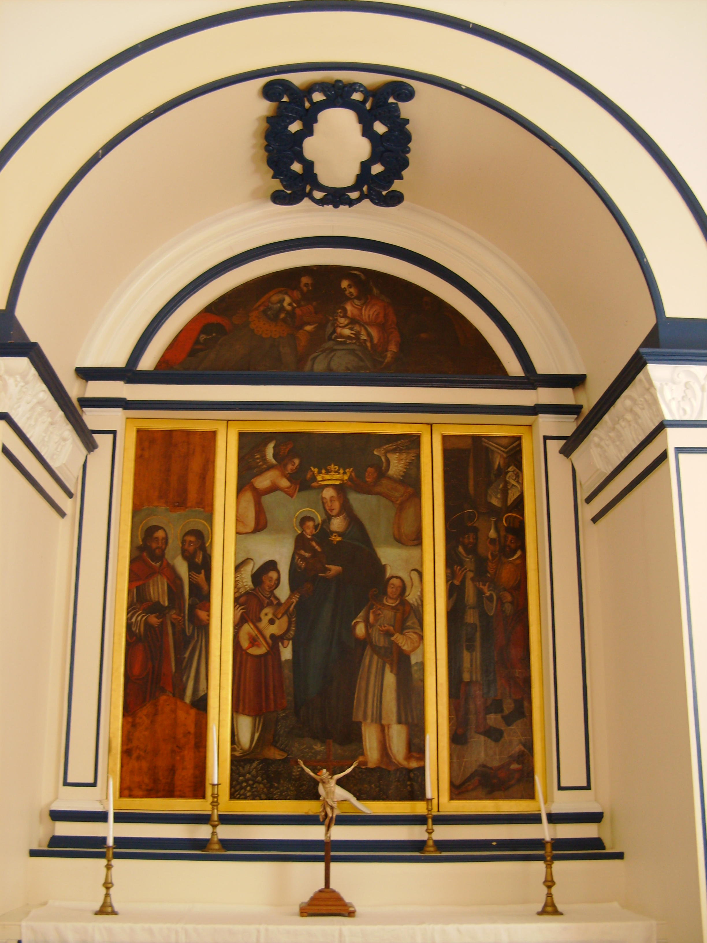 Ermida de Nossa Senhora dos Anjos, freguesia e concelho de Vila do Porto, ilha de Santa Maria, Açores: tríptico pintado sobre madeira de cedro (autor desconhecido, século XVI).